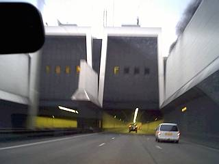 Botlektunnel, januari 2005. Oostelijke ingang. Eigen werk.